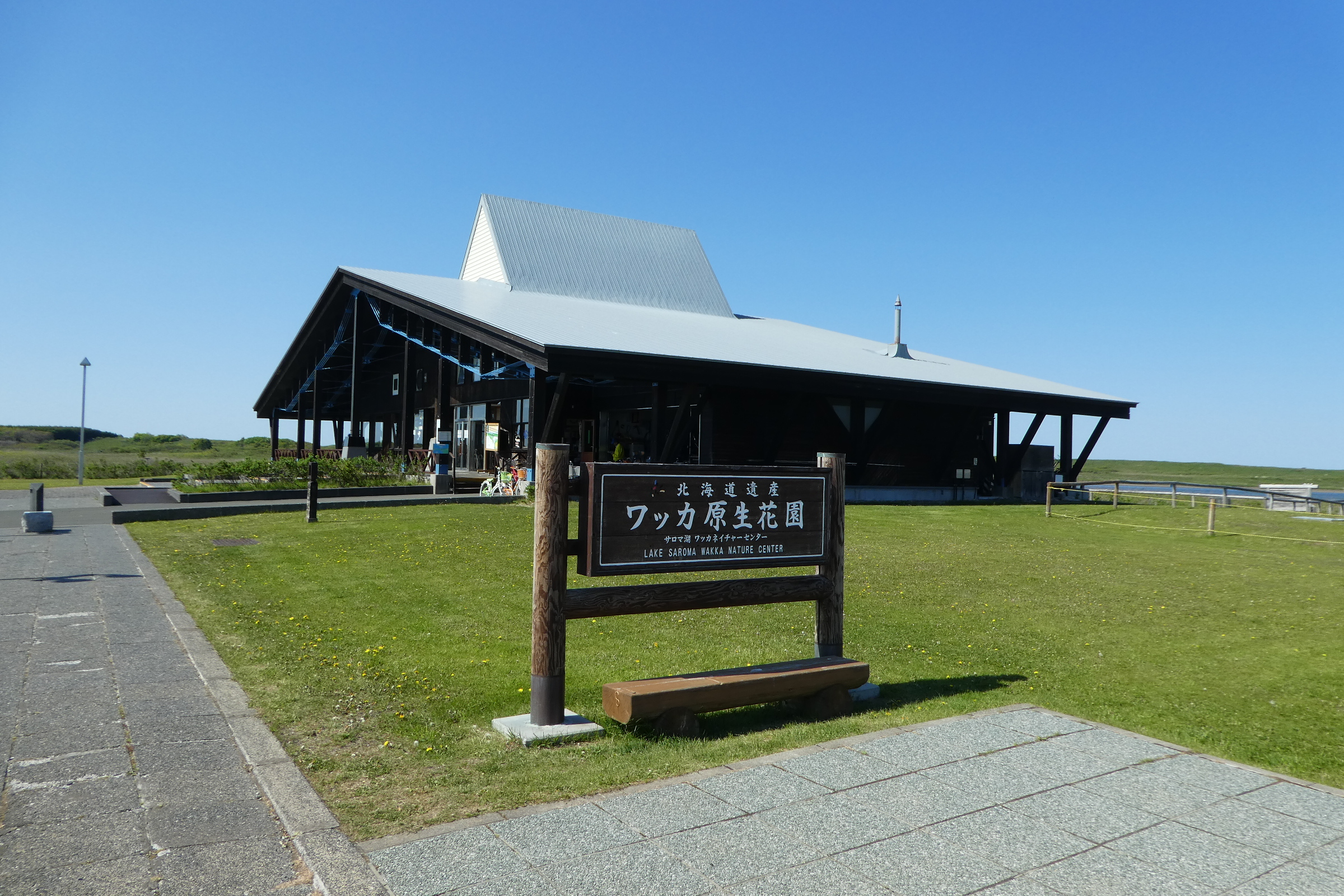 北海道北見市常呂町のワッカネイチャーセンターの写真